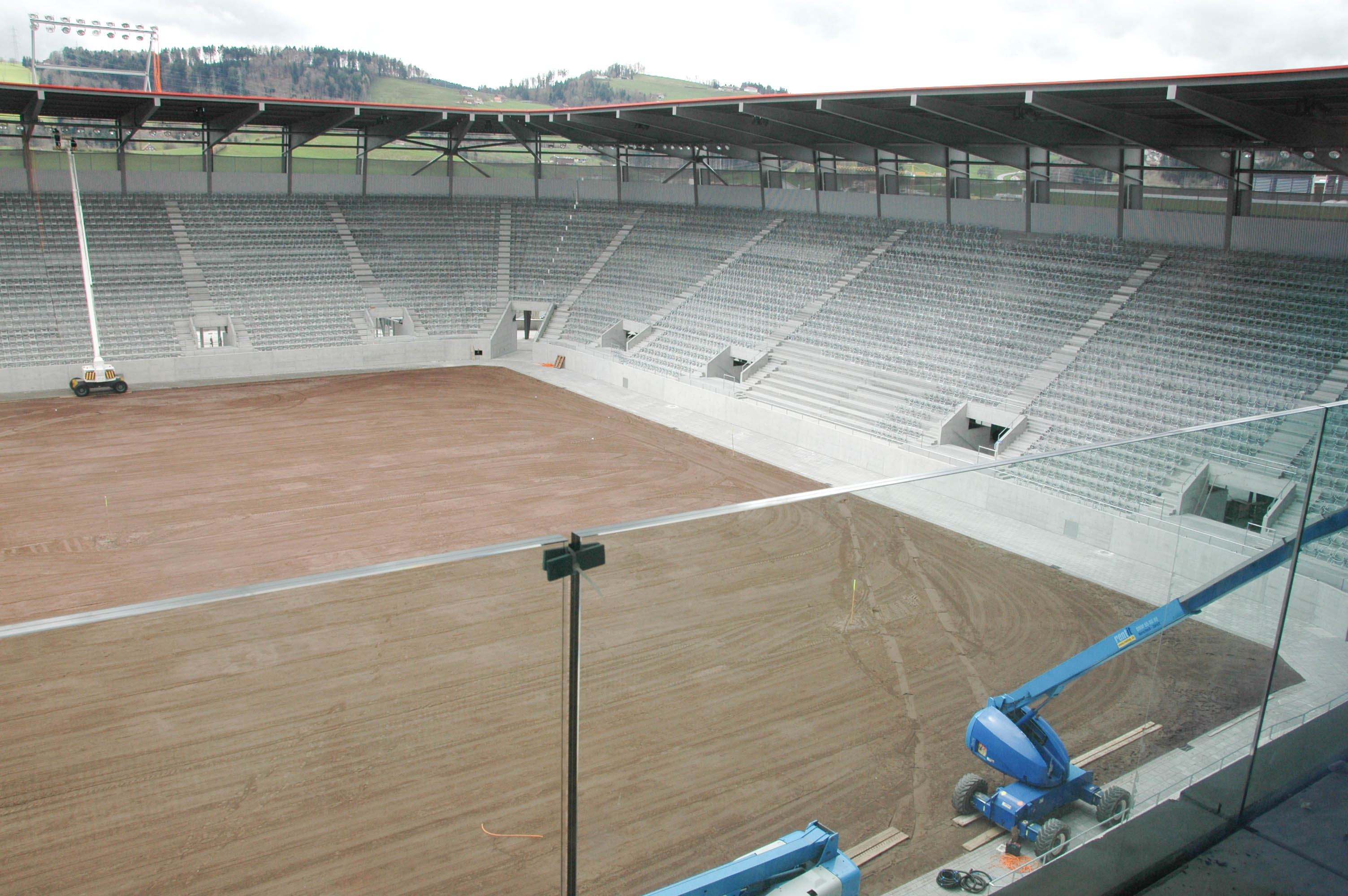 AFG-Arena während der Bauphase